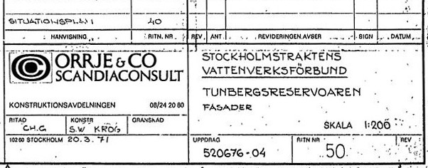 Ritningsstämpel för Tunbergsreservoaren